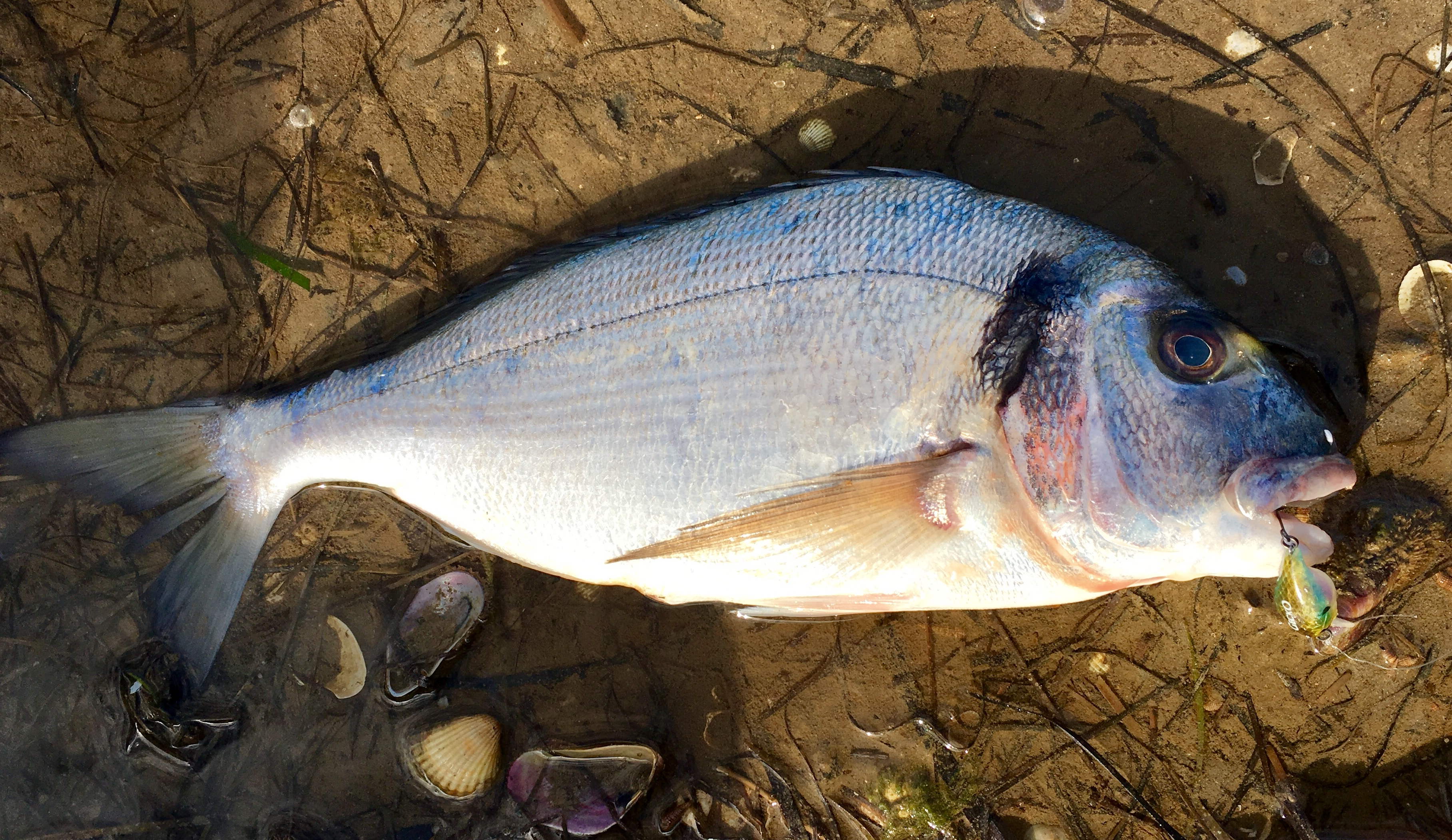 Goldbrasse gefangen in Fossalon